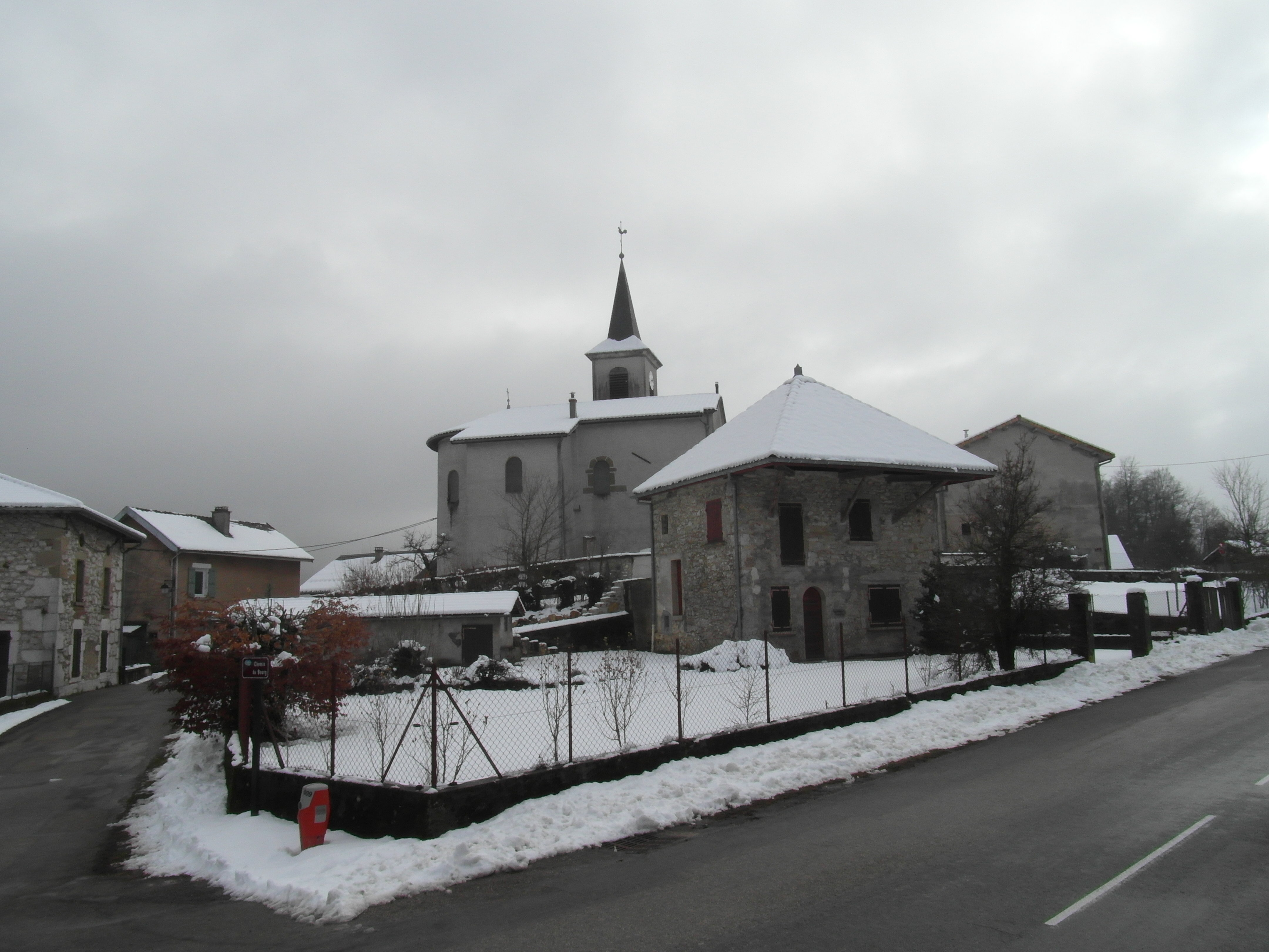 Bourg de Saint-Julien-de-Ratz en hiver